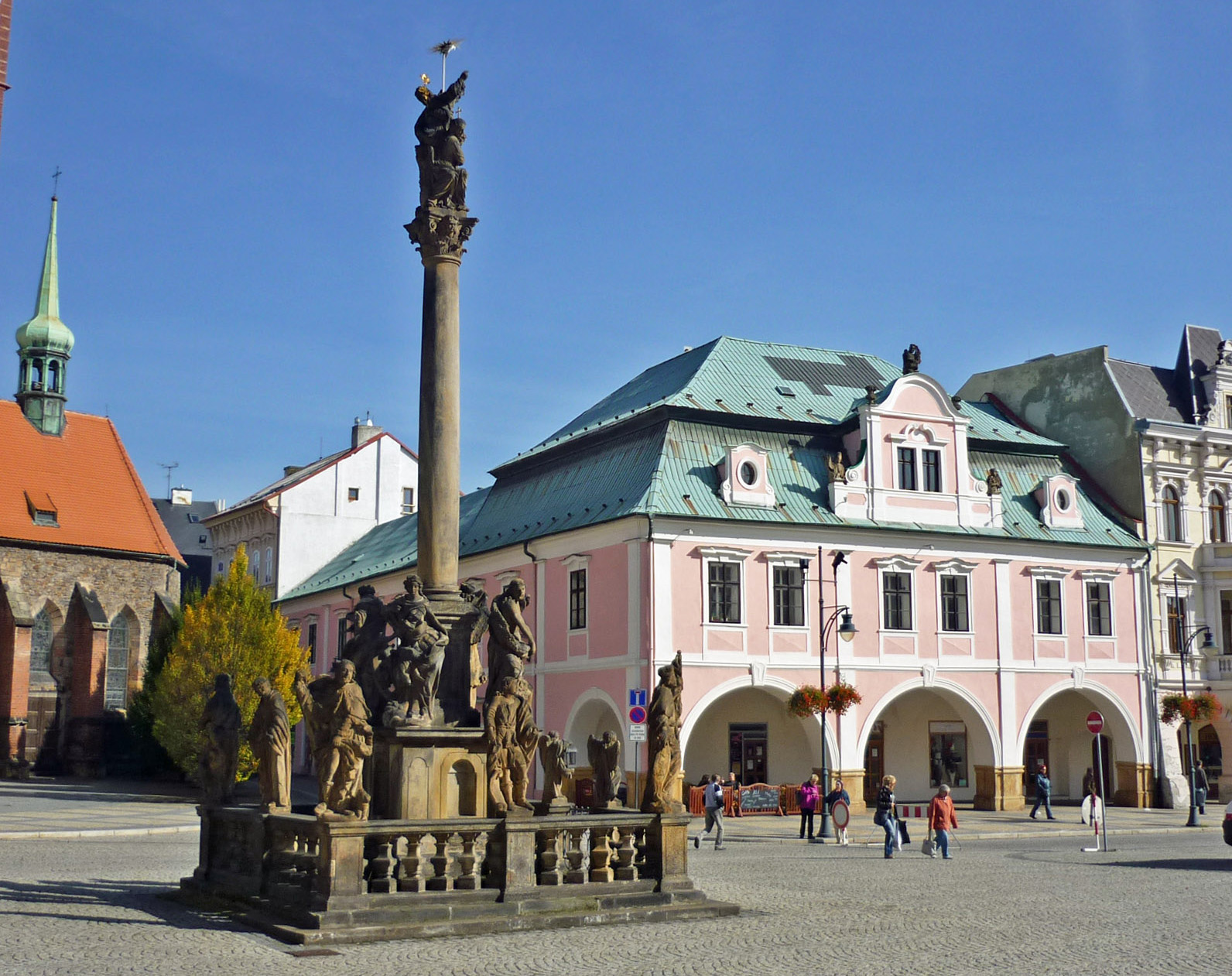 Chomutov, náměstí 1. máje, trojiční sloup a dům čp. 4.